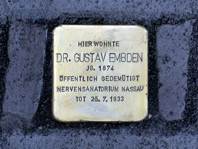 Stolpersteine Kennedaalle 99